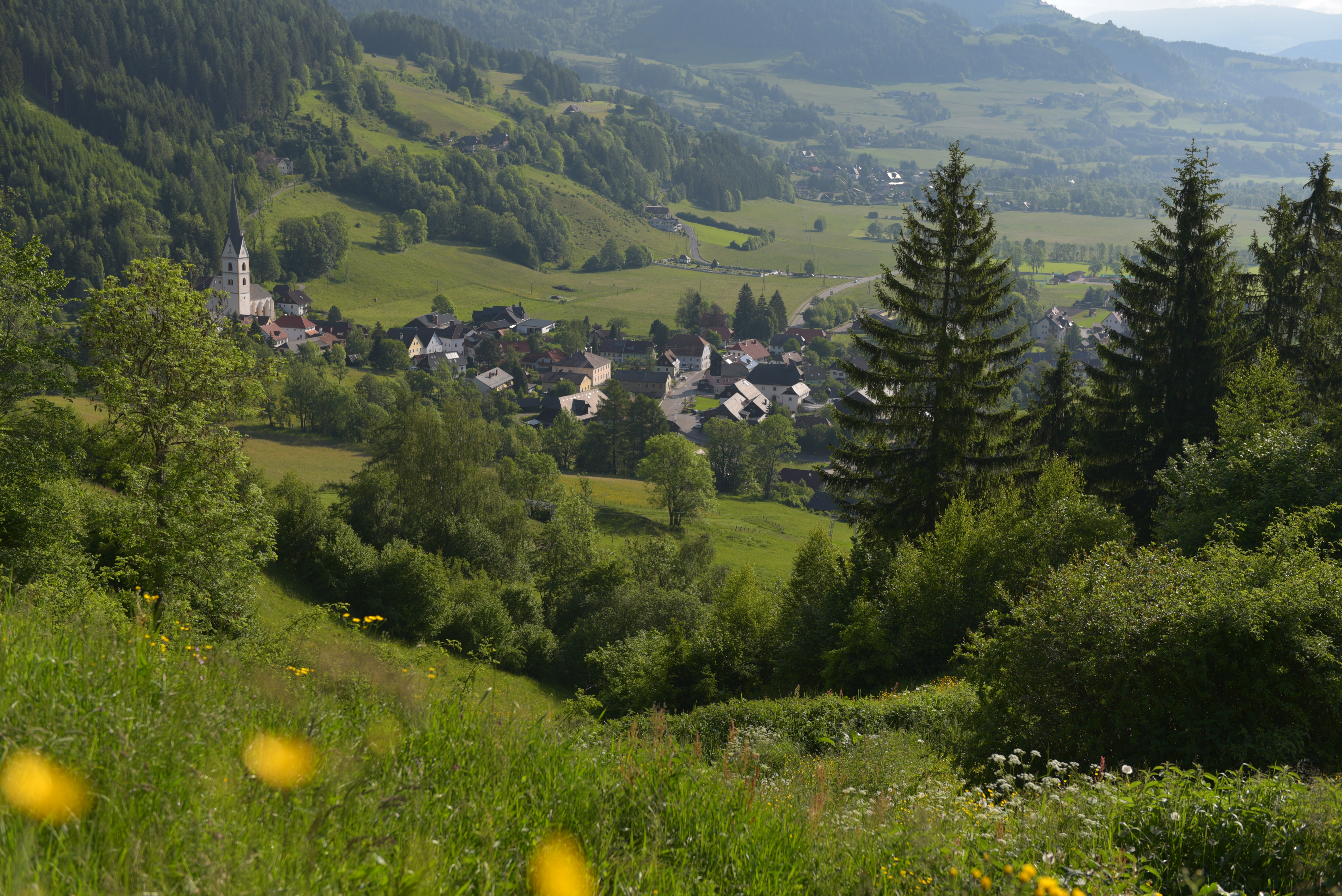 Ansicht des Ortskerns von Schöder, Steiermark mit Blick Richtung Katschtal und den Ortsteil Baierdorf